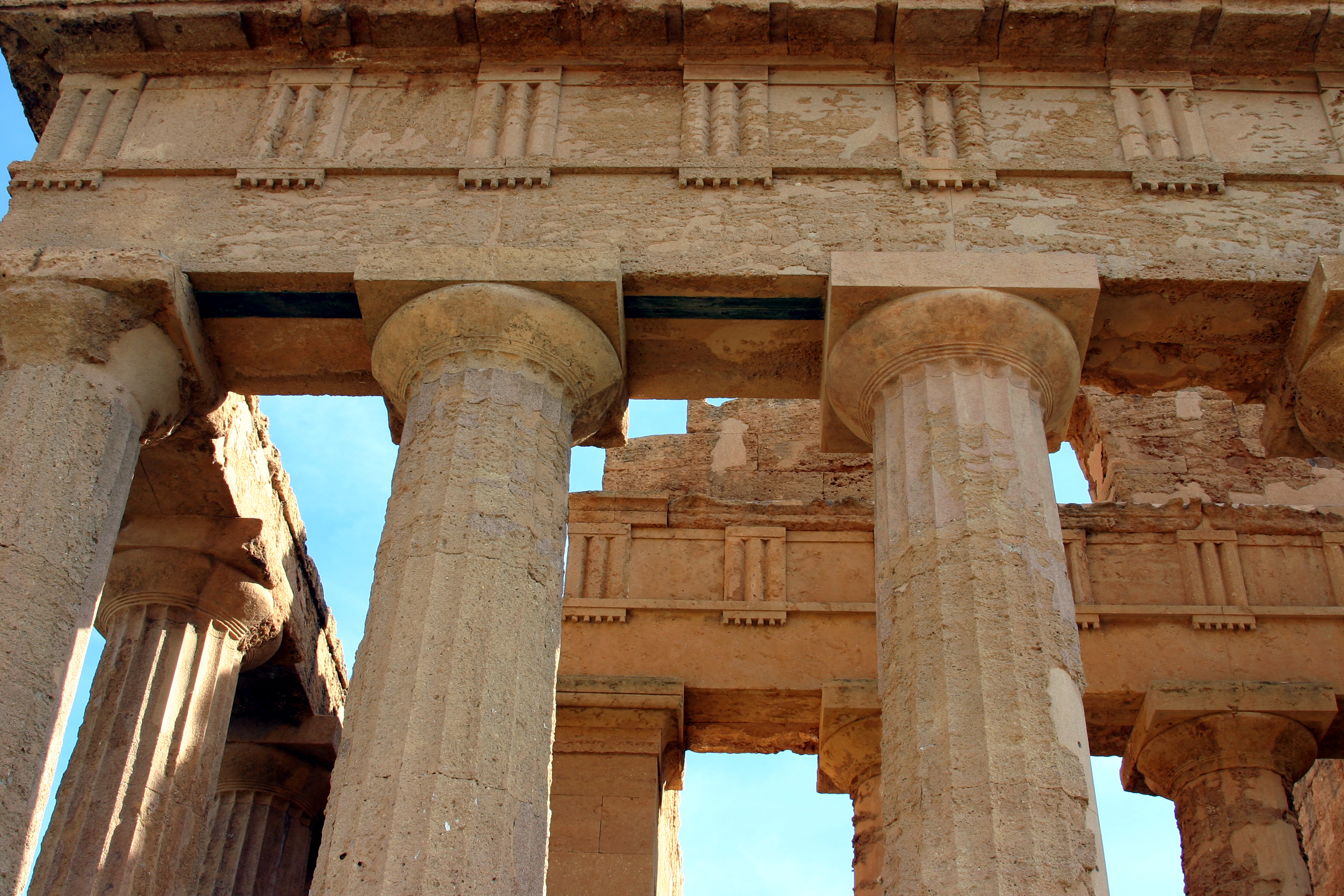 emple of Concordia